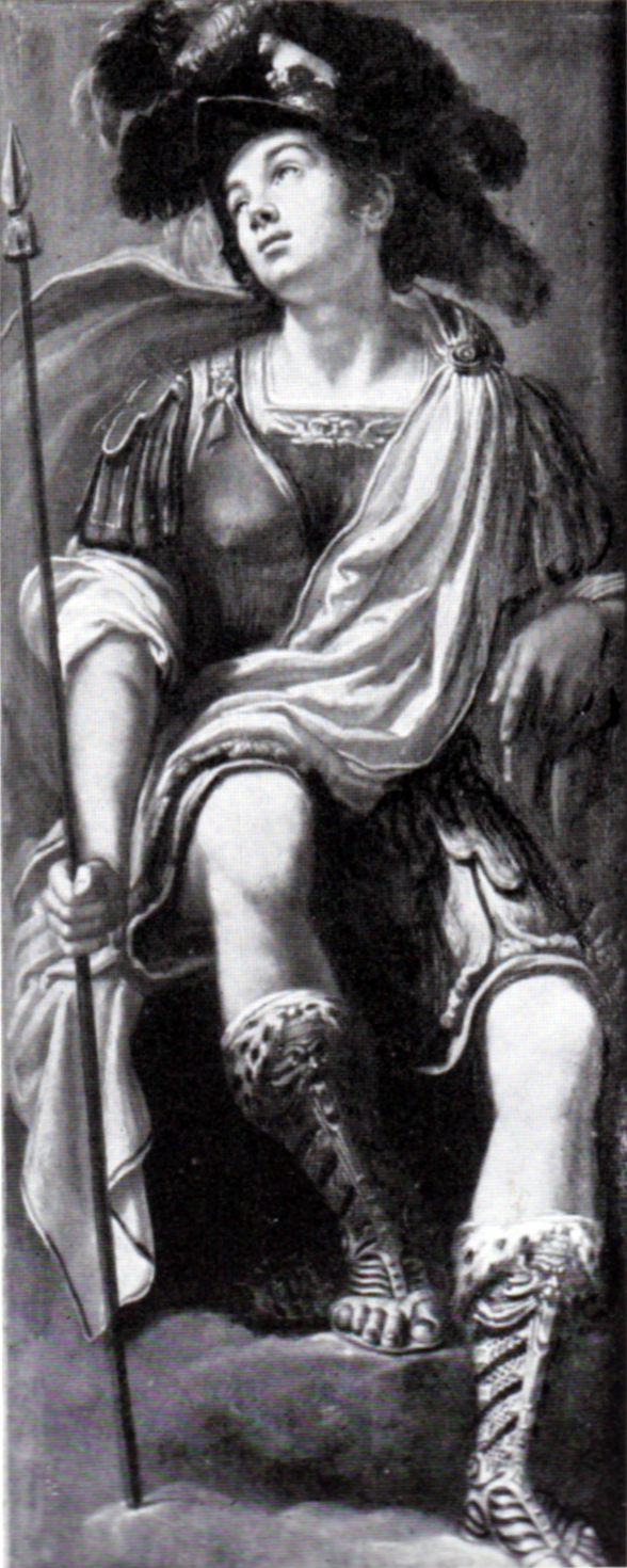 Jacopo vignali, michelangelo e carlo V.jpg